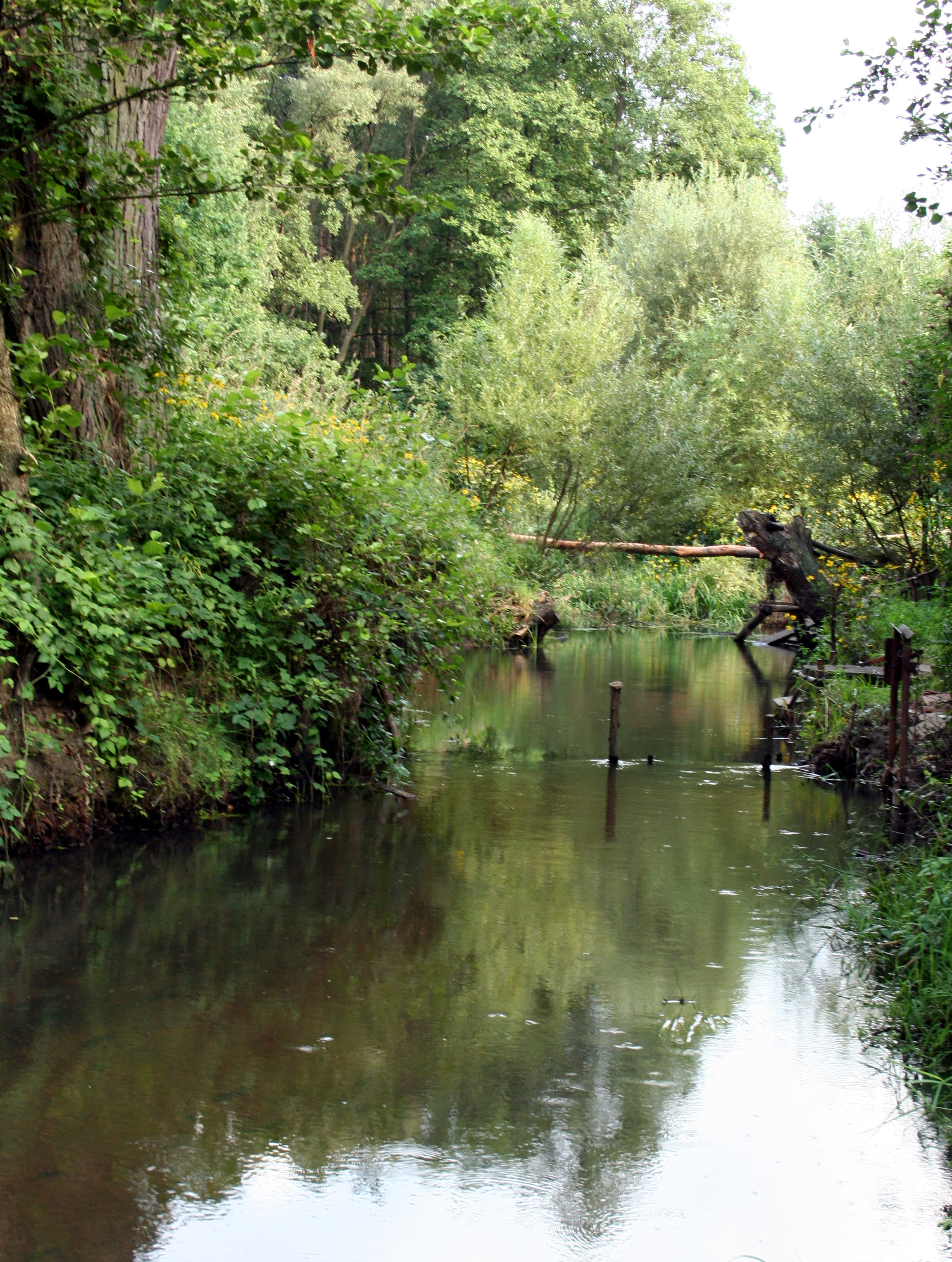 Liswarta w miejscowości Tanina, powiat lubliniecki